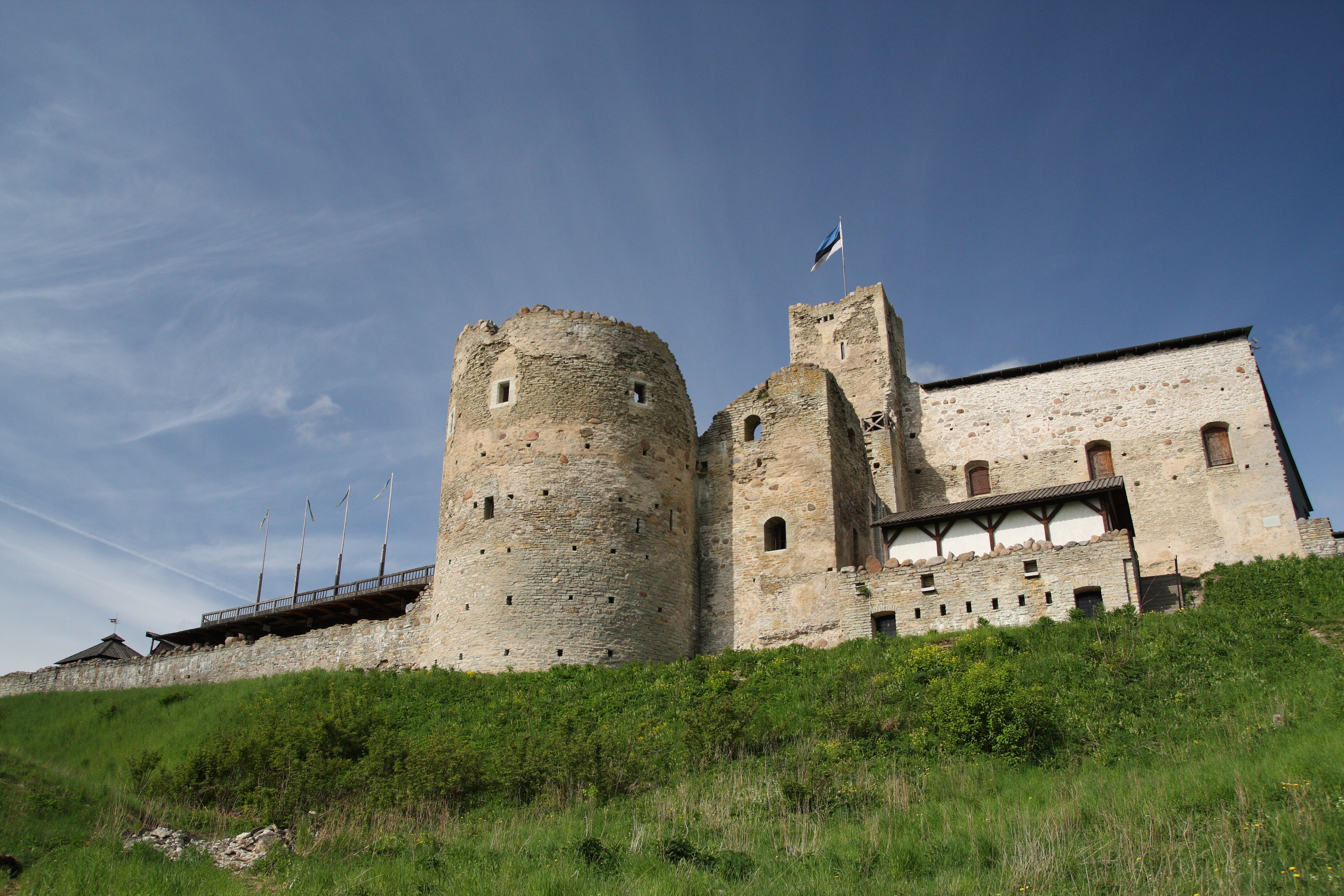 Rakvere, Estonia